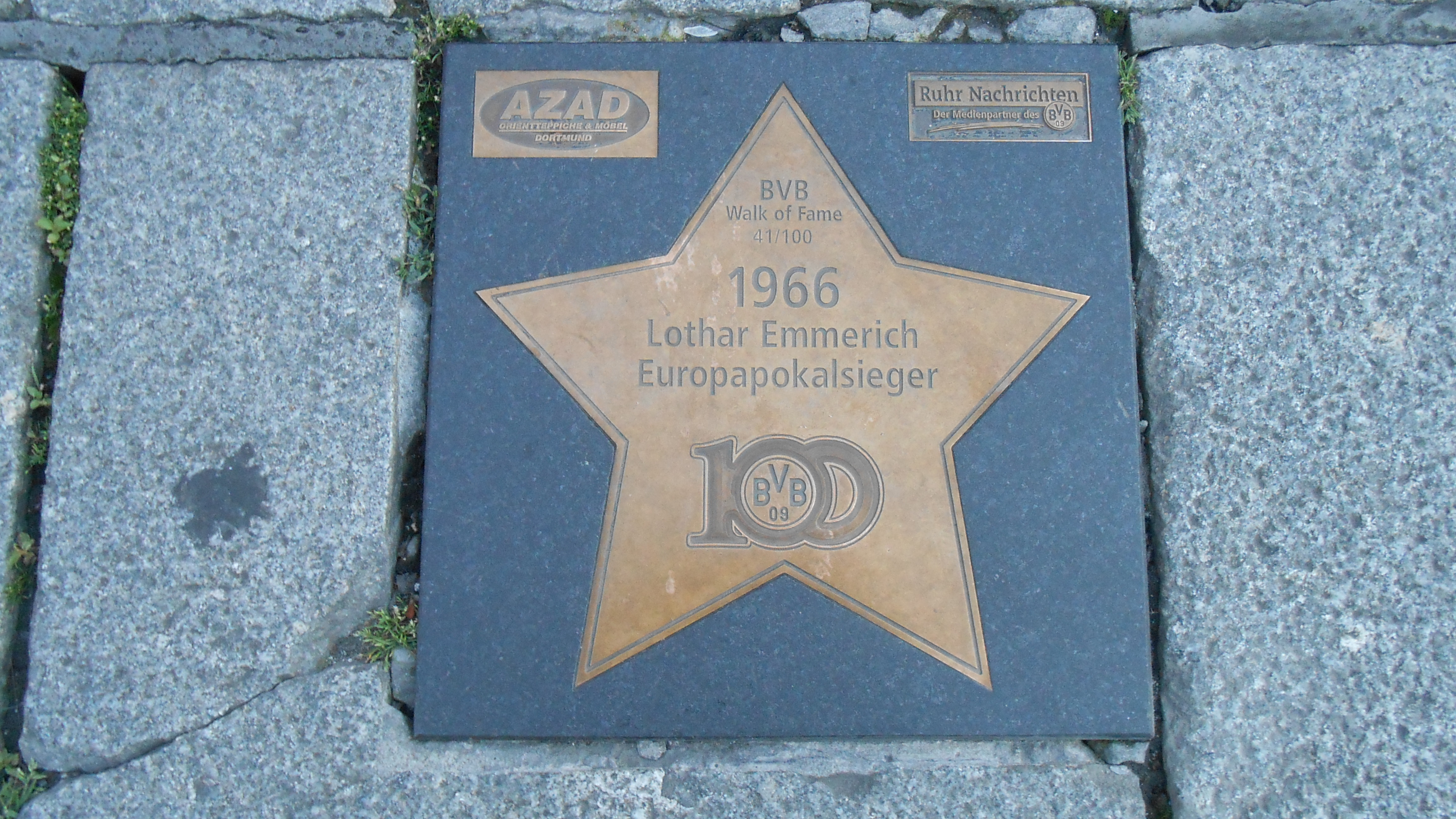 BVB Walk of Fame 41-100ː 1966 Lothar Emmerich Europapokalsieger